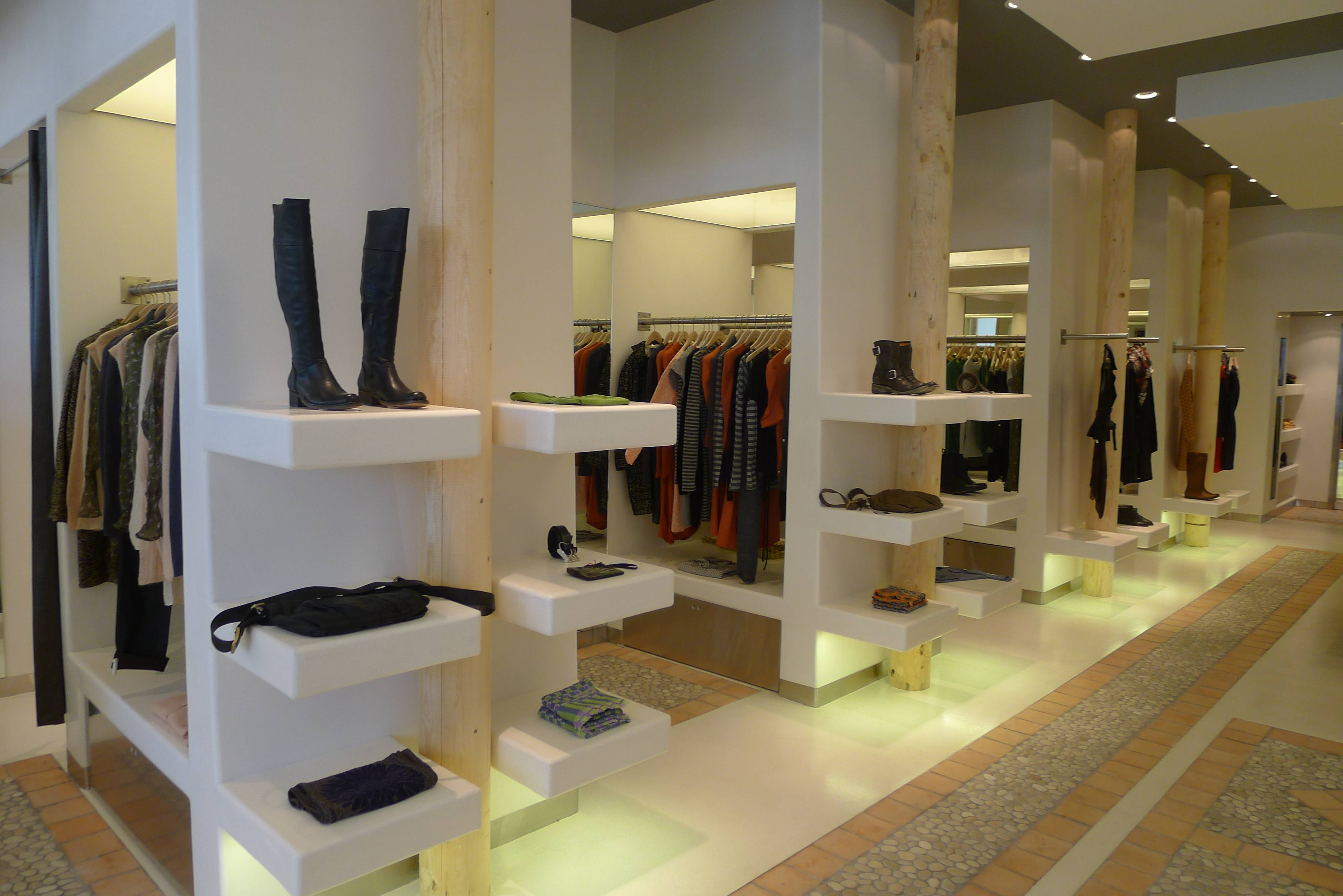 Intérieur de la boutique Cotélac de San Francisco